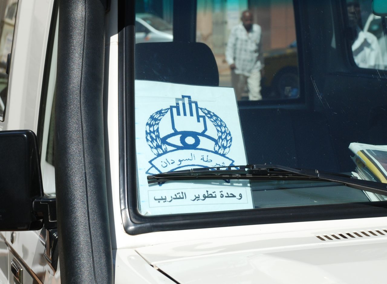 Fatimahand, offizielle grafische Darstellung in Sudan. Khartum.